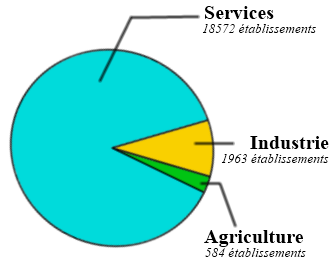 Secteurs d'activités vendée